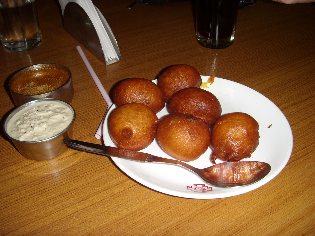 Bajji, indian breakfast.